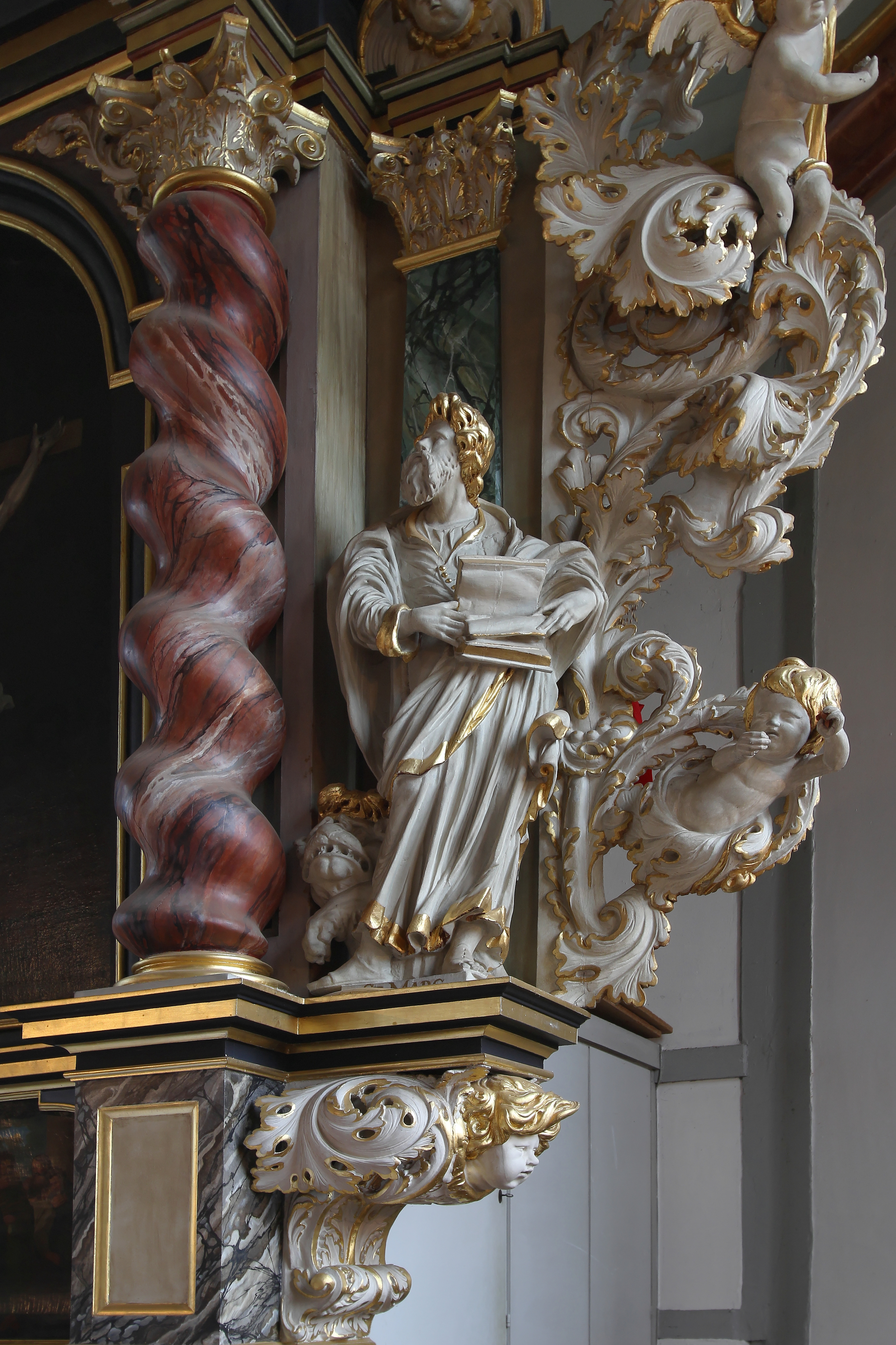 St. Nikolai, Hamburg-Moorfleet, Innenraum, rechte Seite des Altars